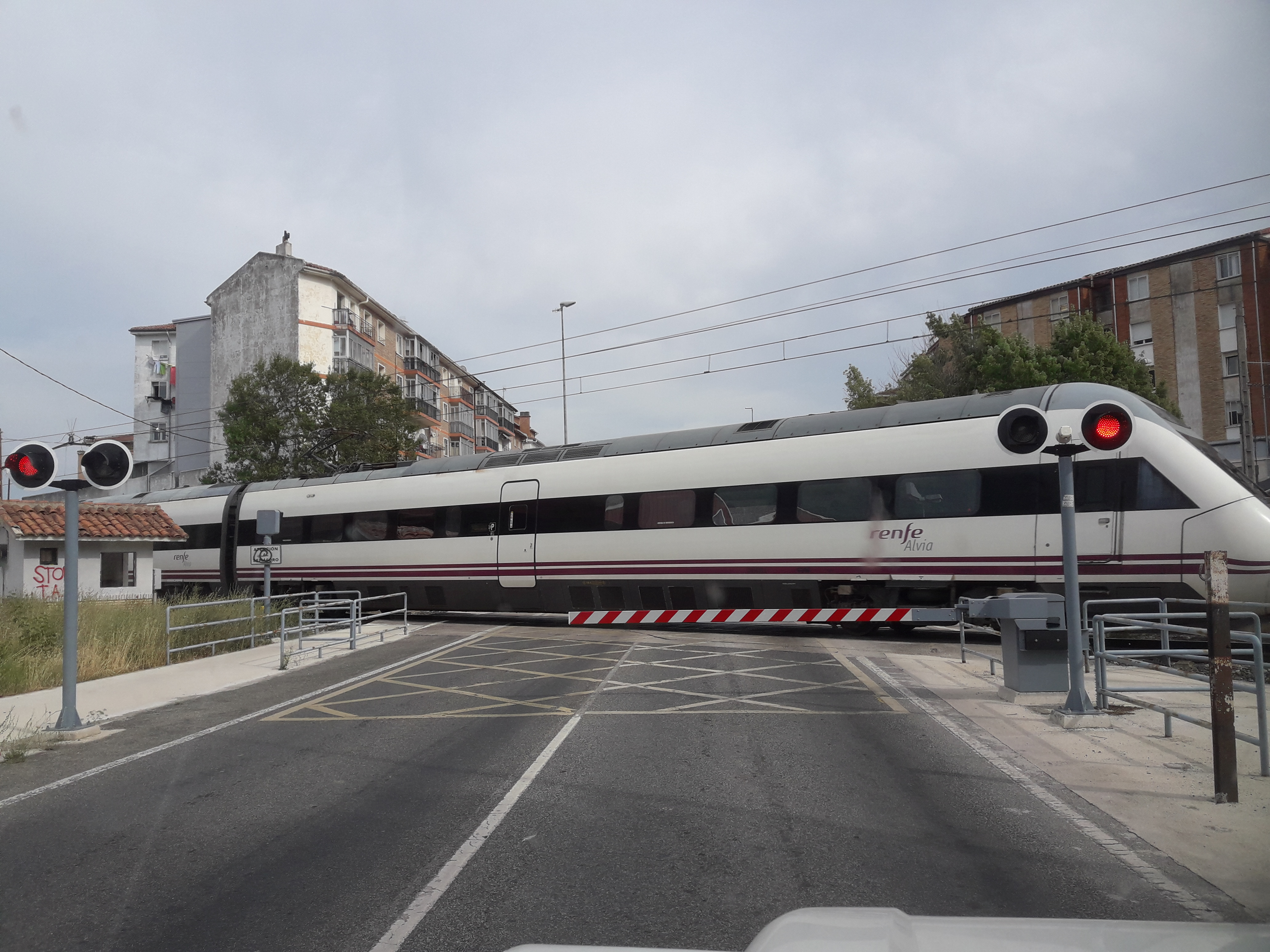 Pas a nivell a Berriozar.